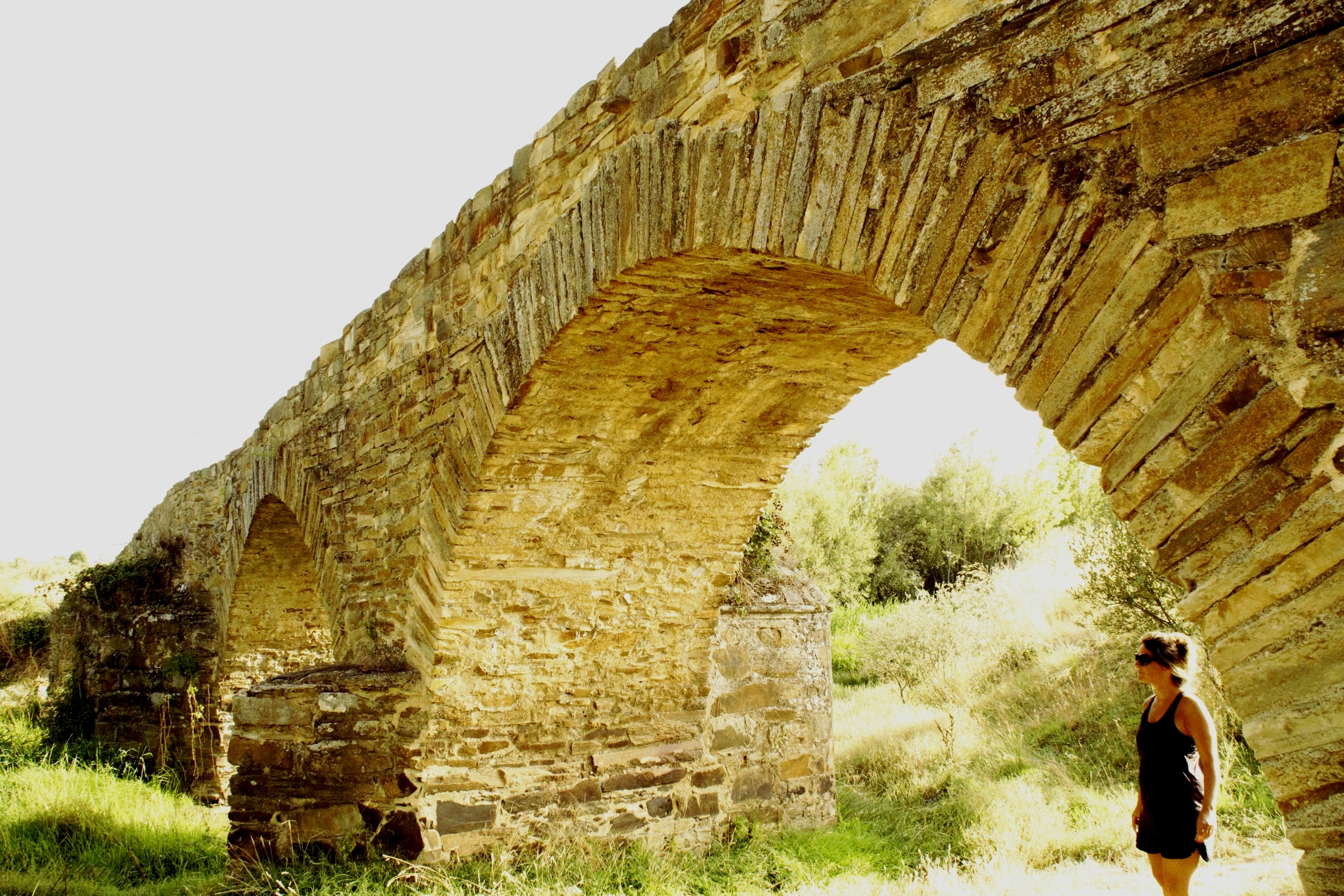 Puente Viejo de Valimbre